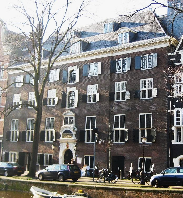 Stadsbank van Lening in Amsterdam, Oude Zijds Voorburgwal 300.